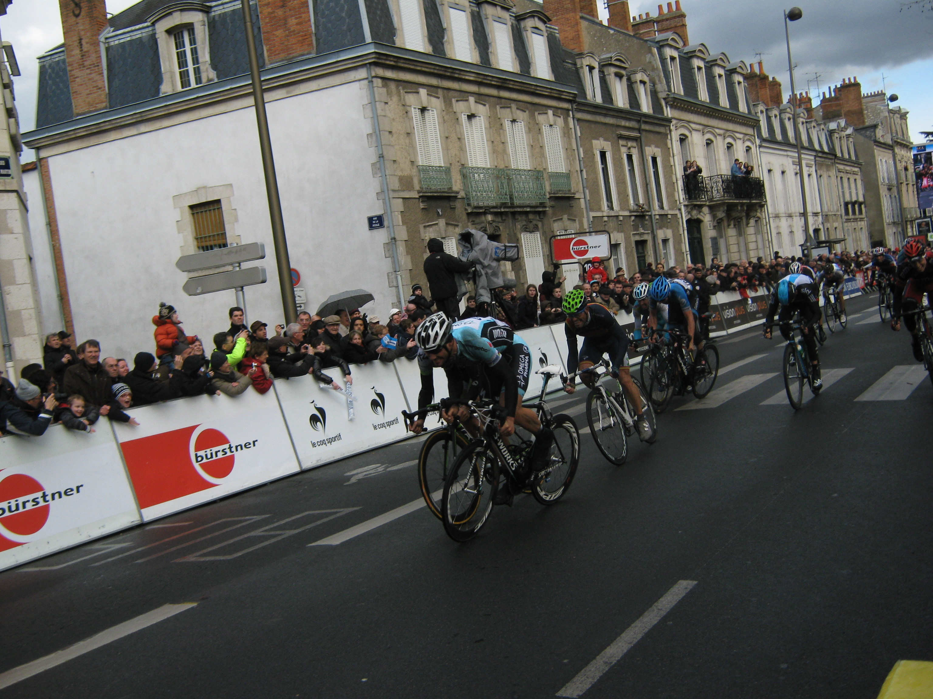 Paris-Nice 2012, 2e étape : arrivée de l'échappée à Orléans